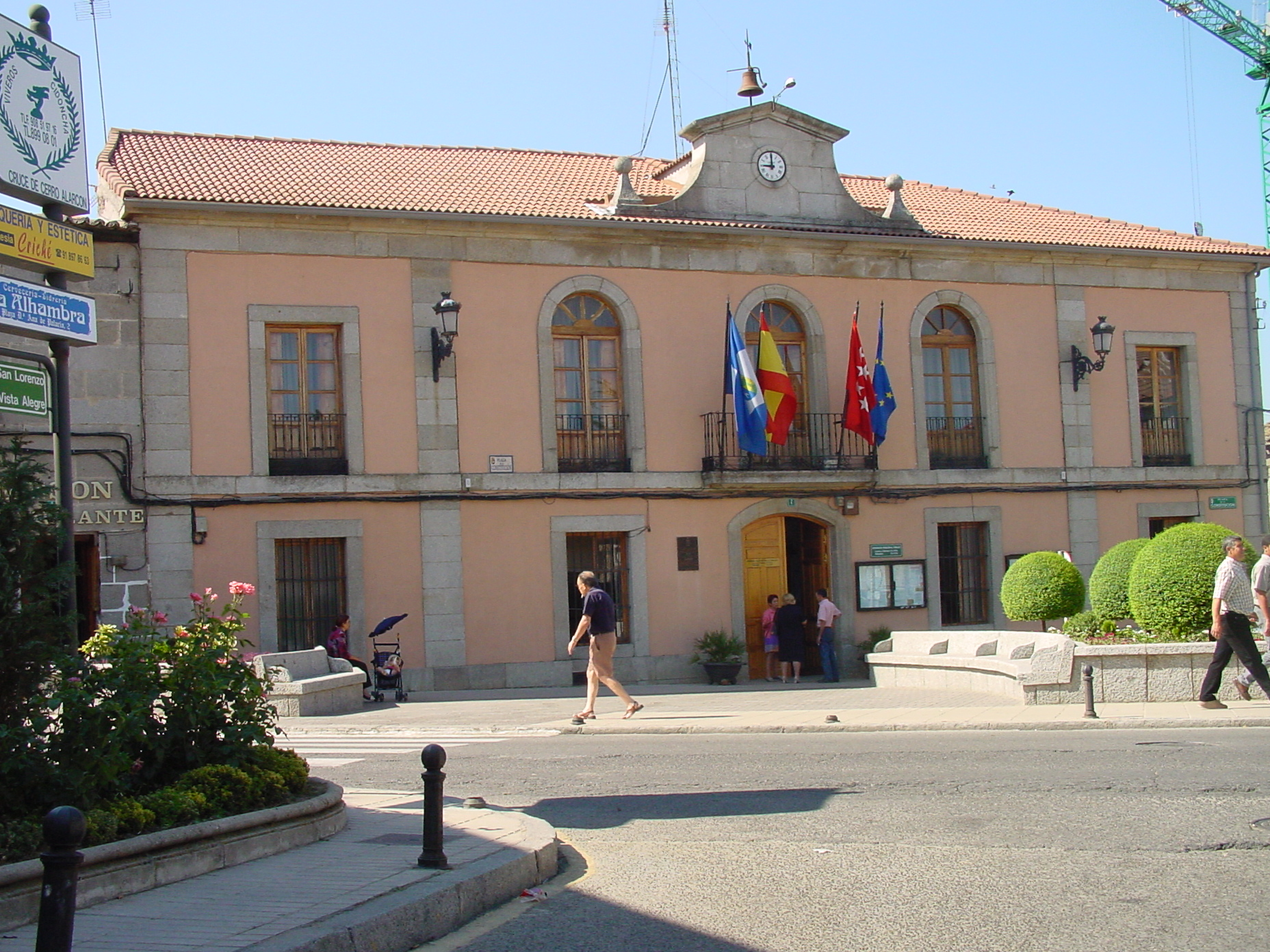 Ayuntamiento de Valdemorillo.